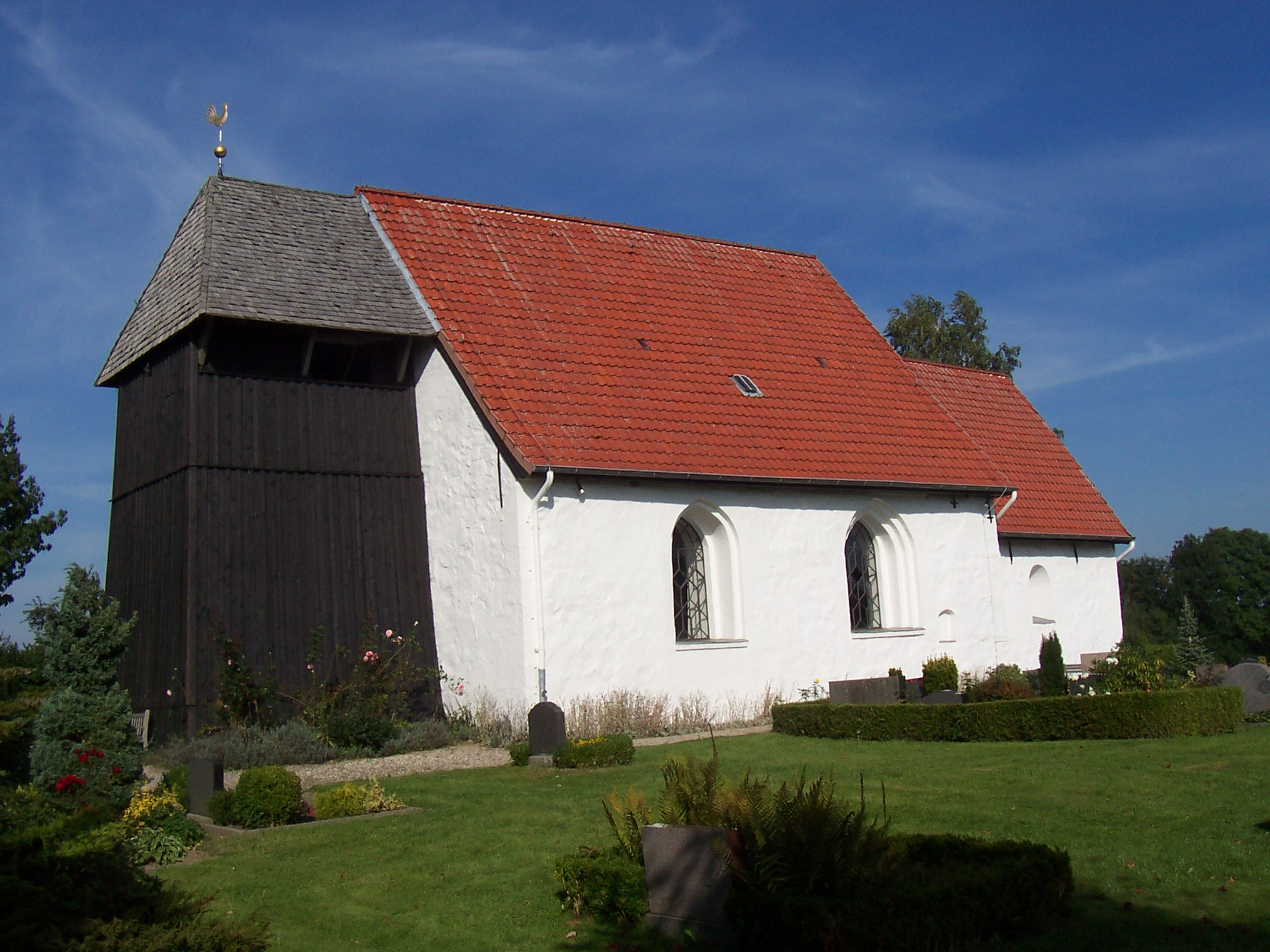 St. Andreas Kirche Brodersby